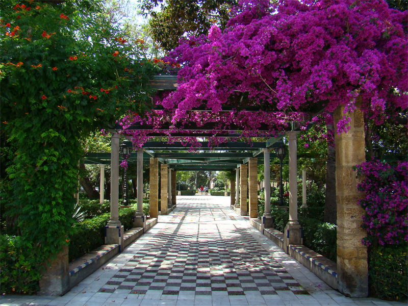 Alameda Apodaca, Cádiz, Andalucía, España.